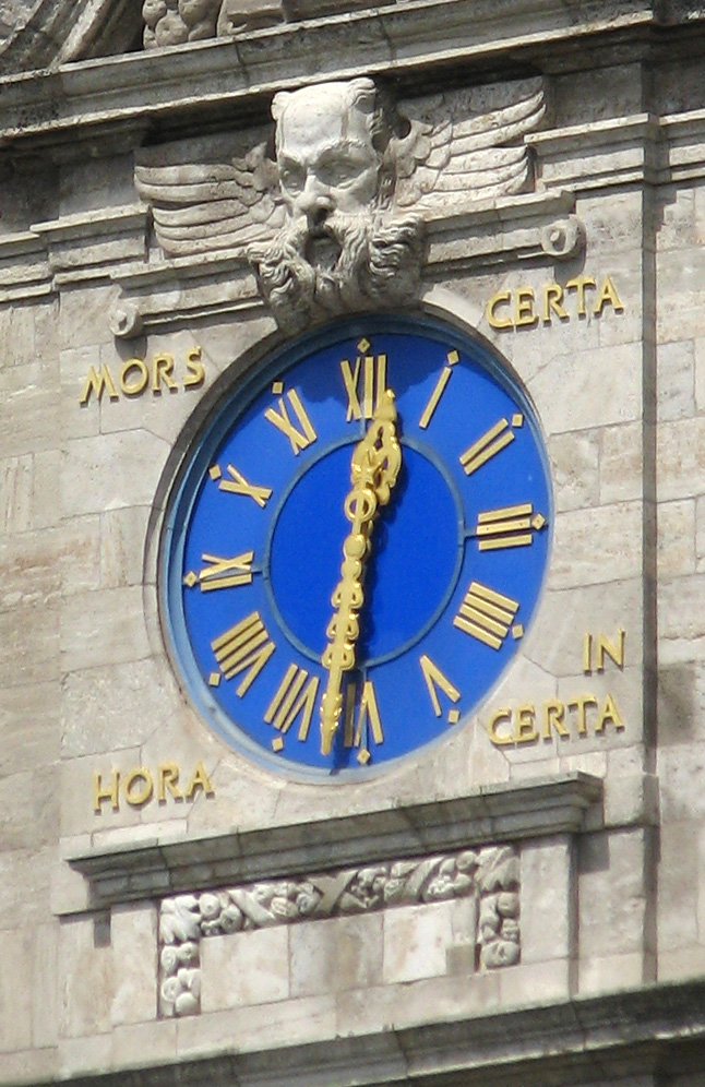 Detailansicht der Uhr des Neuen Rathaus (Leipzig). Geschmückt mit den Worten: "MORS CERTA HORA INCERTA" - Der Tod ist sicher, die Stunde ungewiss.